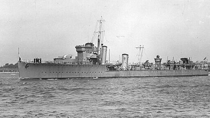 Das Geleitboot HMS WHITLEY (L 23), ein umgebauter Zerstörer der V&W-Klasse